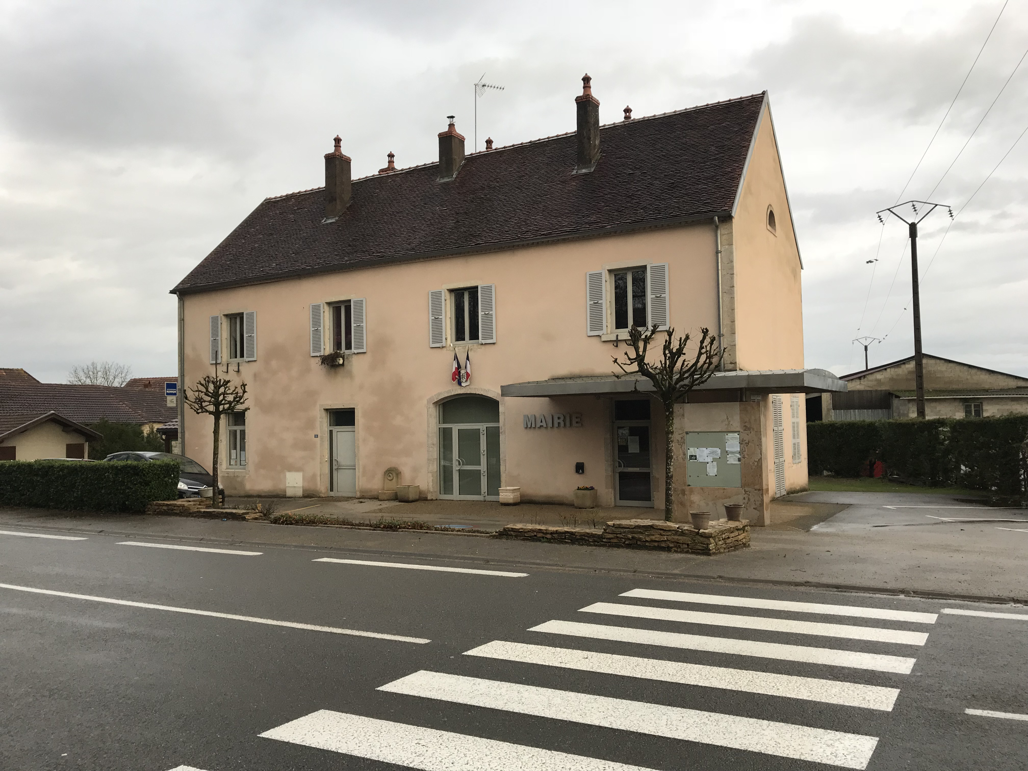 Nevy-lès-Dole (Jura, France) le 6 janvier 2018.